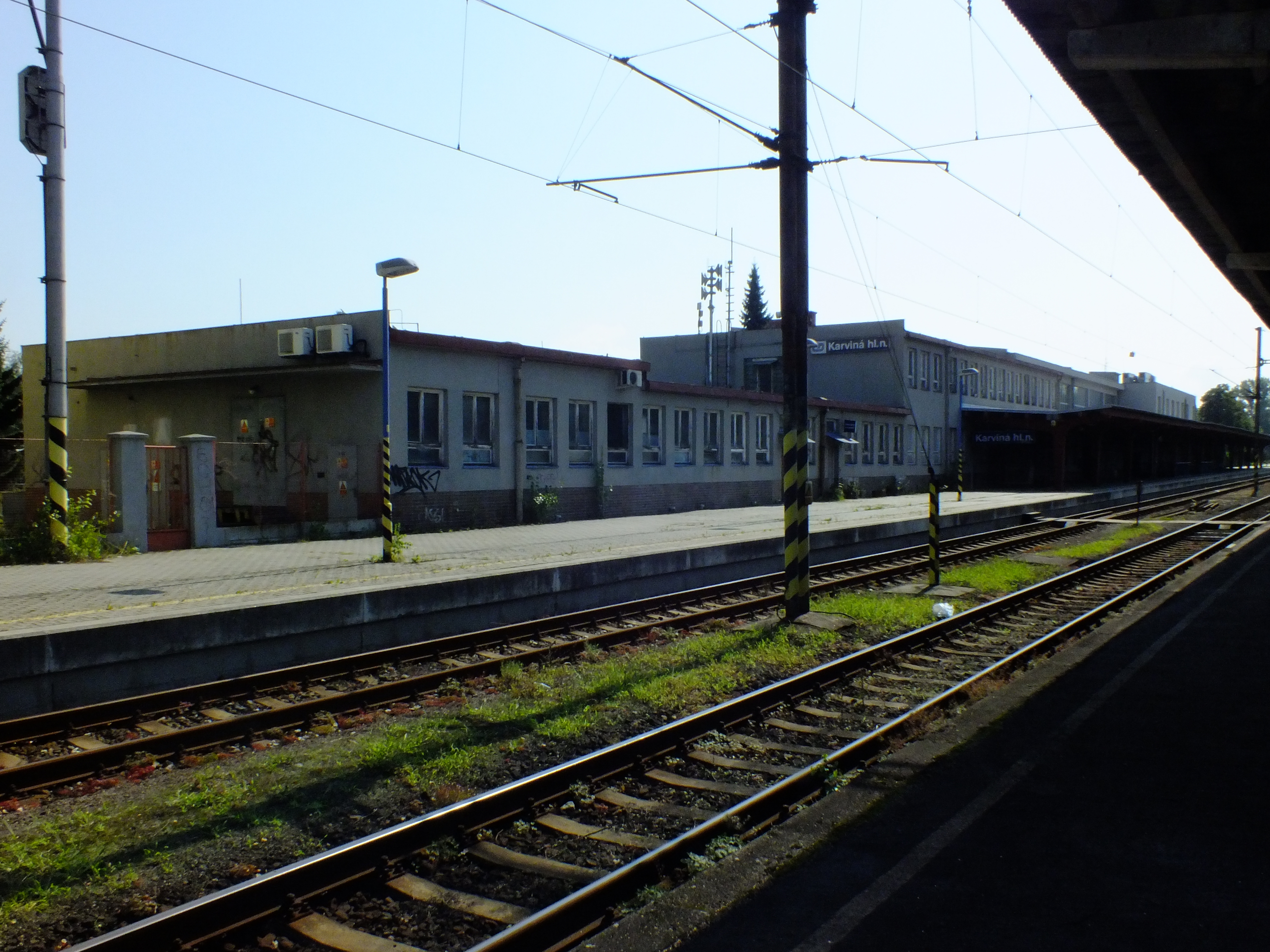 Staniční budova